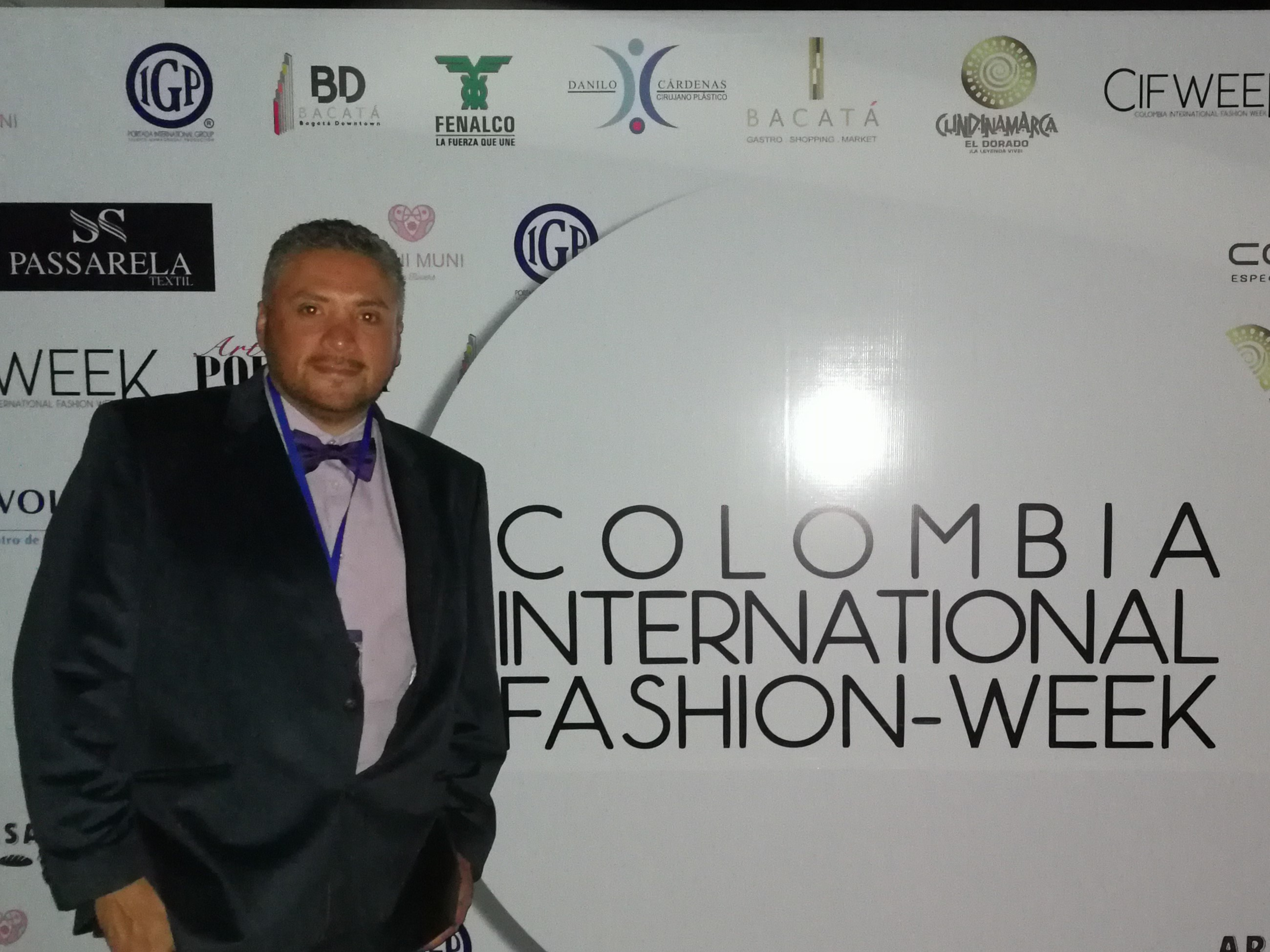 GUSTAVO HINCAPIE